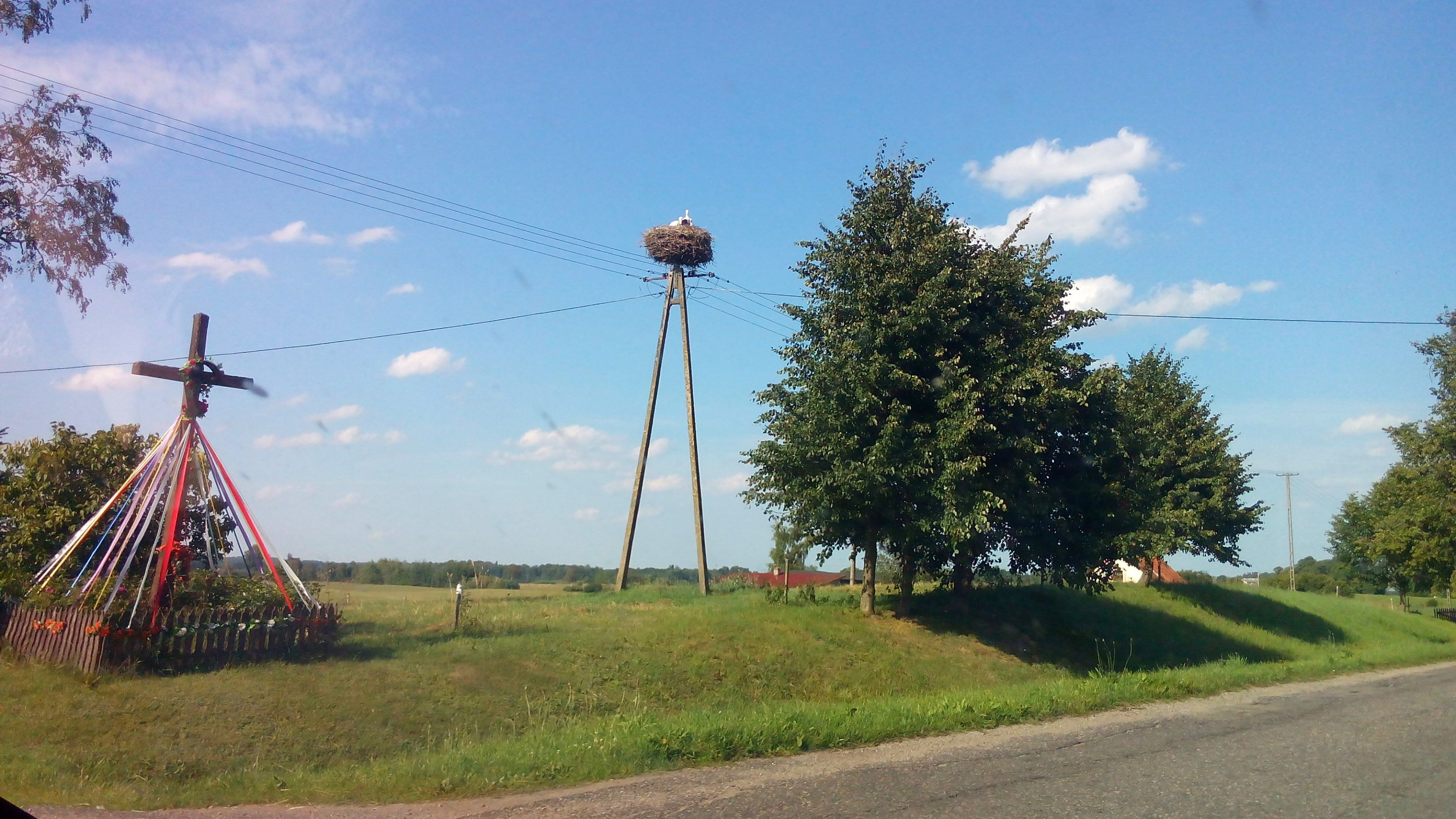 Gniazdo bociana białego znajdujące się we wsi Woryny